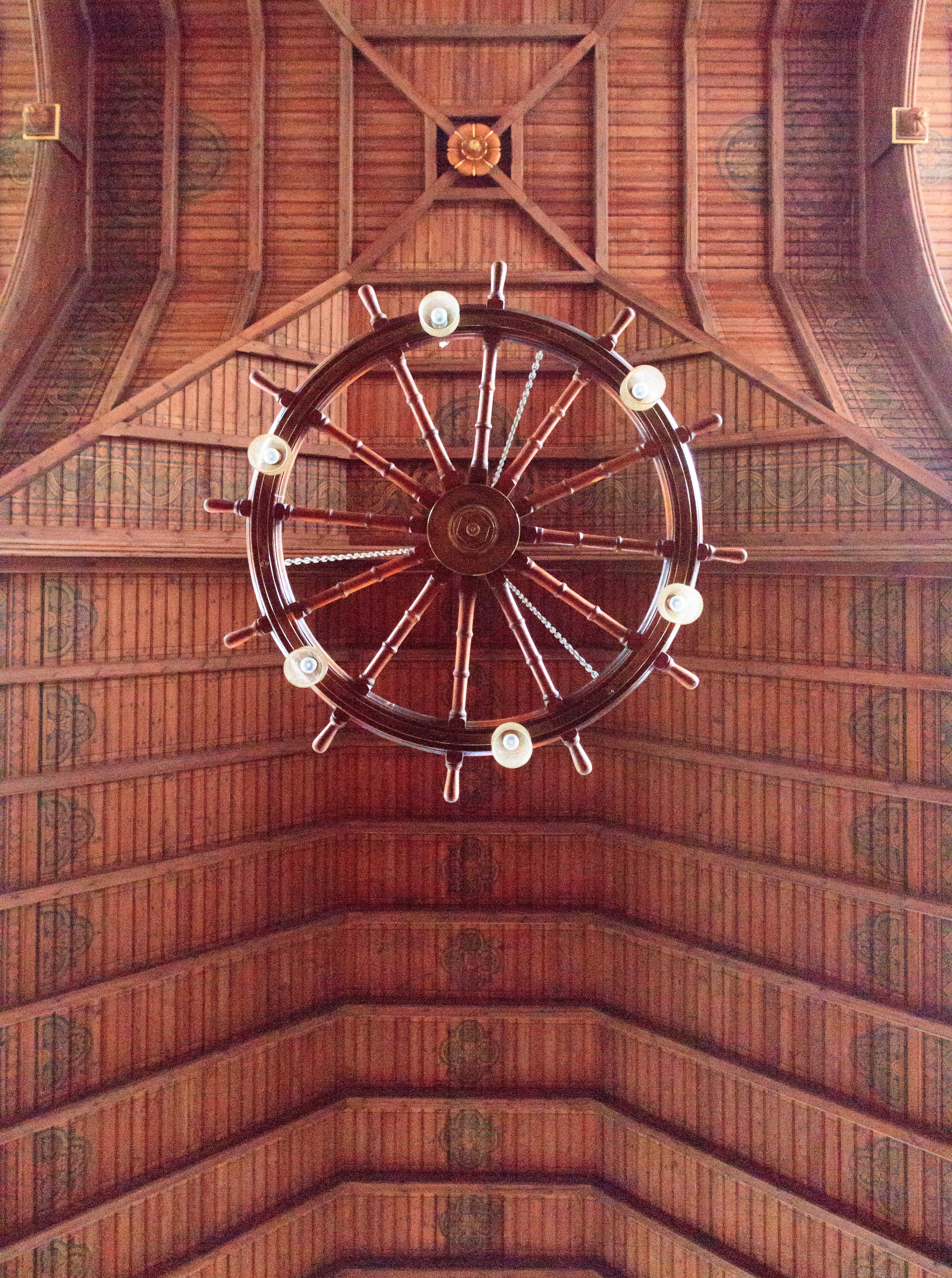 Borkum Reformierte Kirche Deckenleuchter